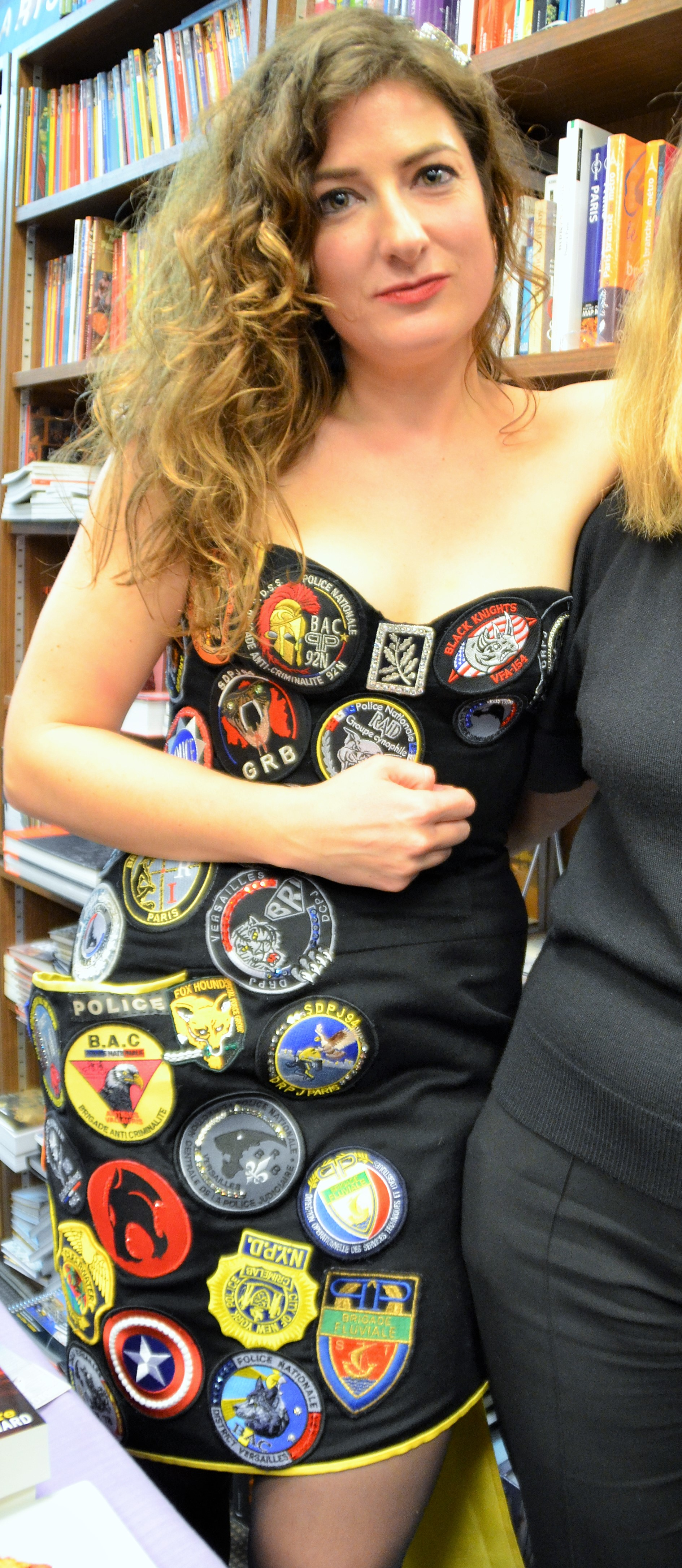 Ingrid Astier portant une robe de terrain écussons lors du lancement d'Angle Mort à la Librairie Gallimard